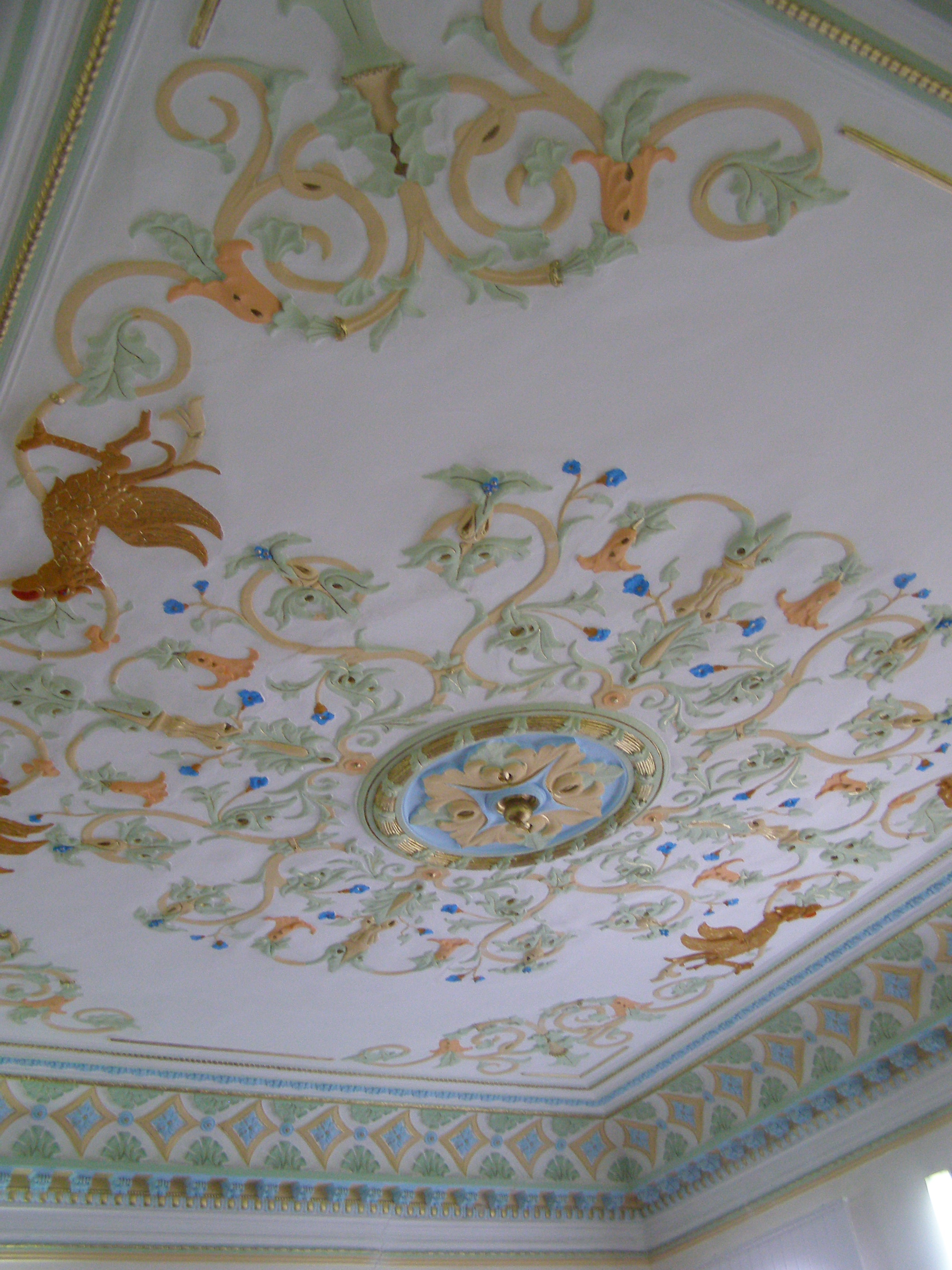 Садиба Неплюєвих, Глухів, вул. Києво-Московська, 43